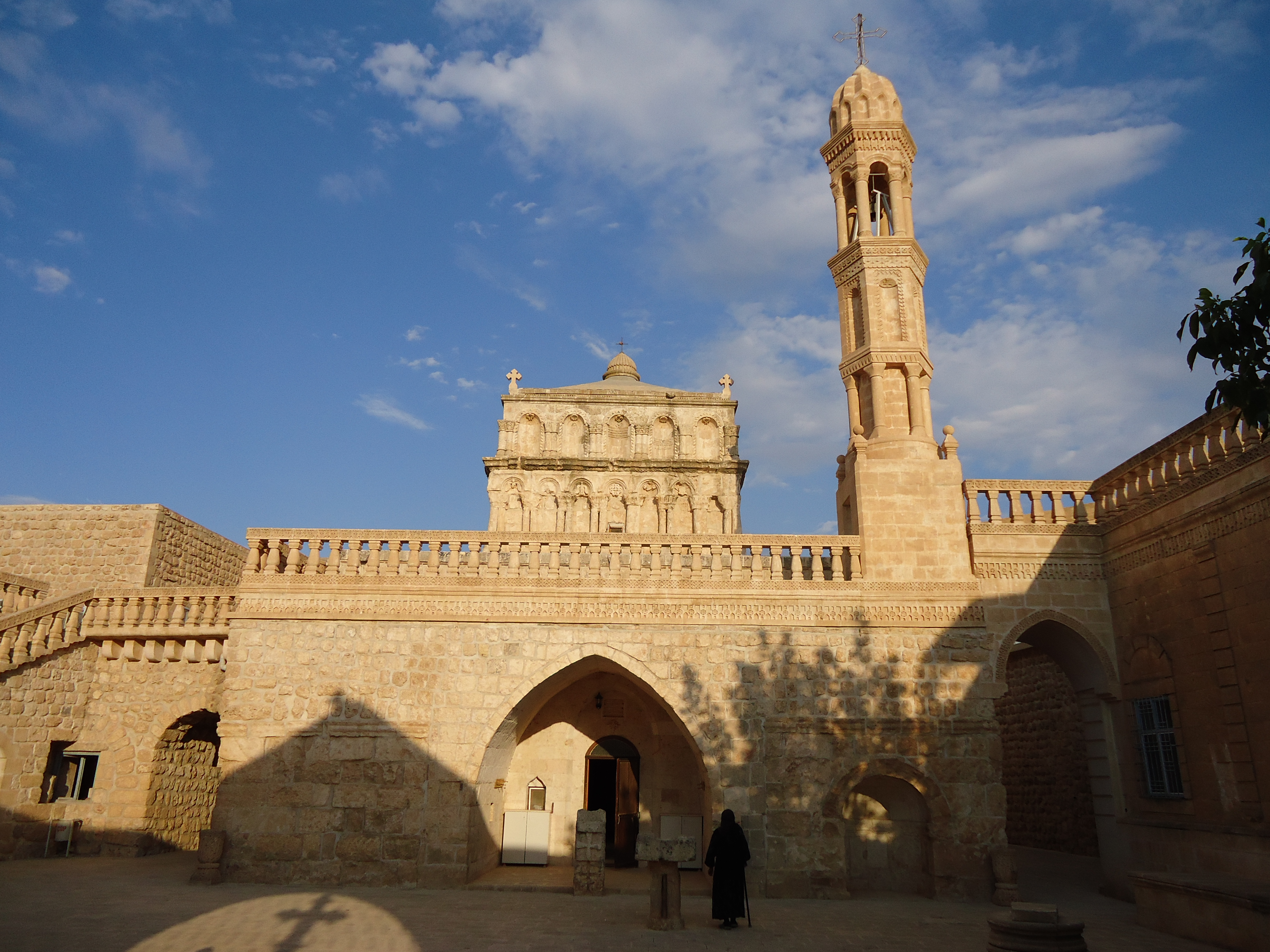 Muttergotteskirche Hah